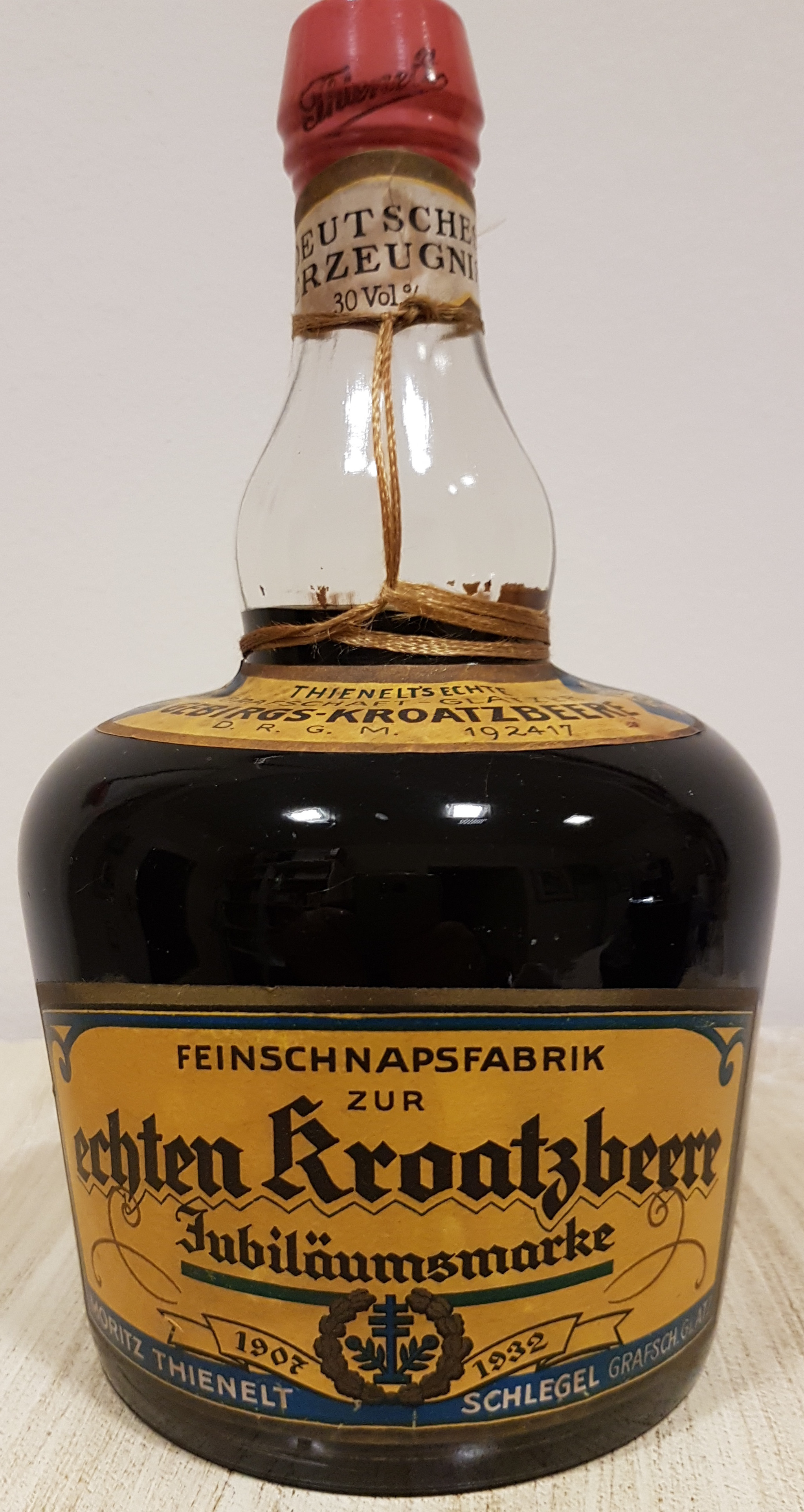 Bild der Flasche Echte Kroatzbeere von 1932